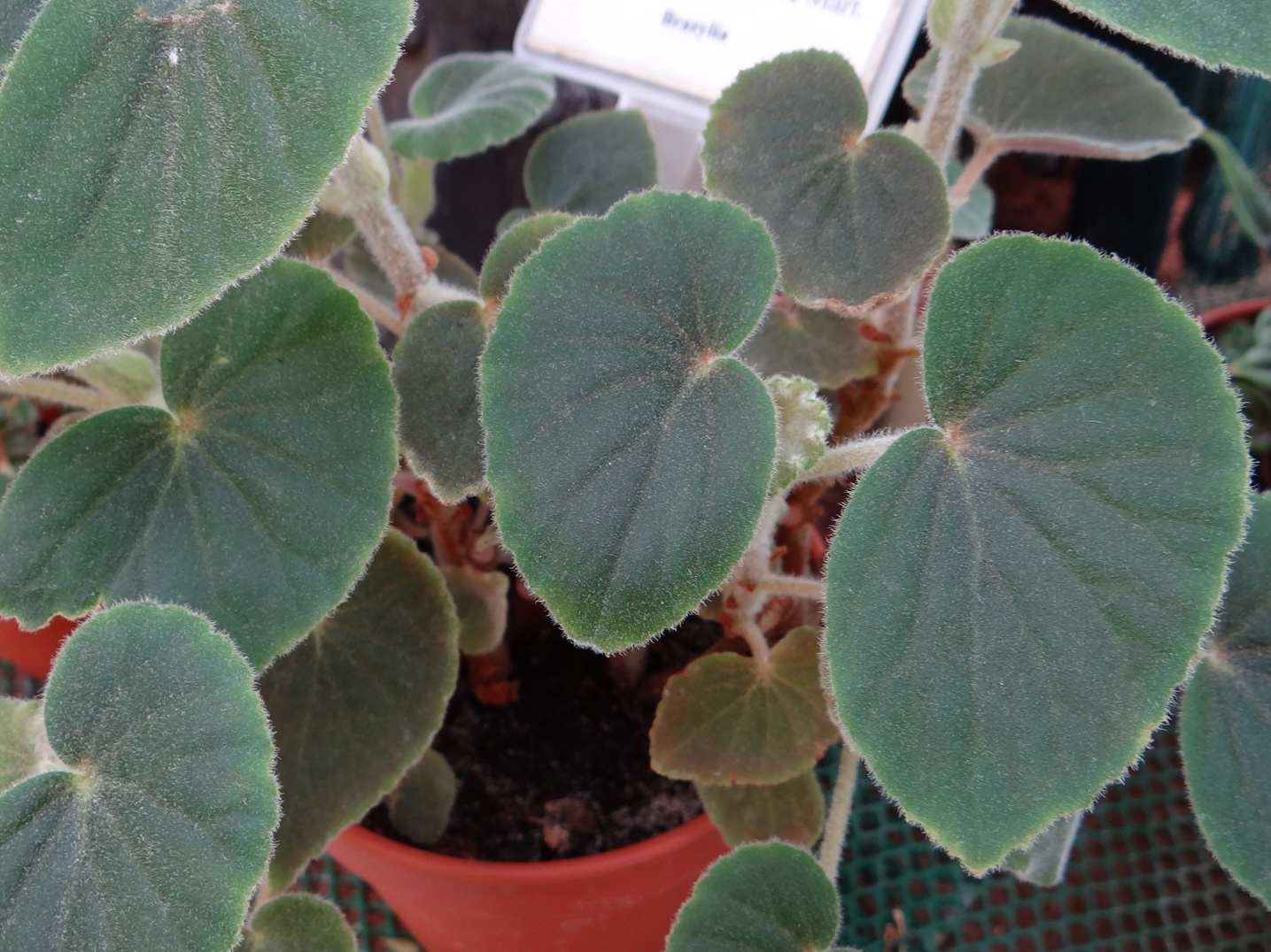 Begonia phyllomaniaca